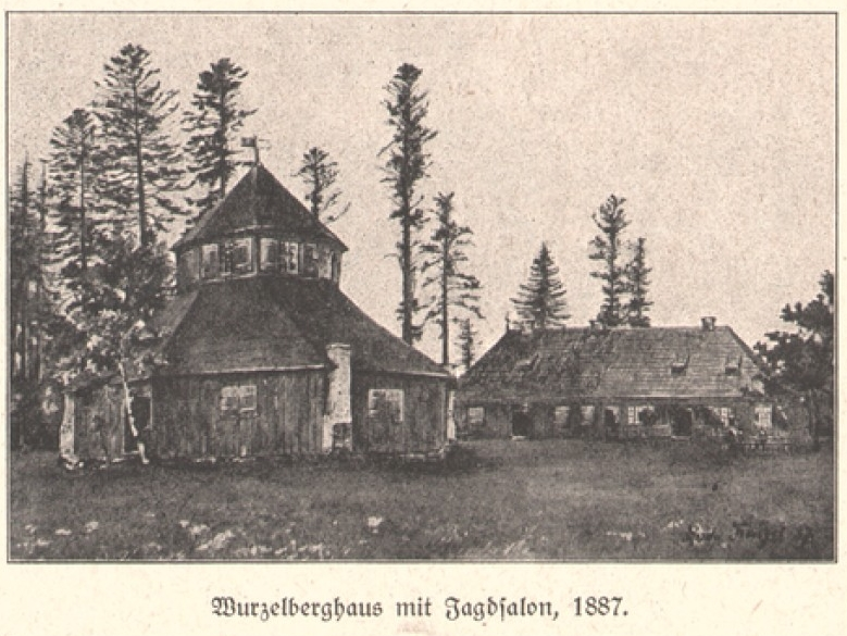 Das ursprüngliche Wurzelberghaus (oktogonales Holzhaus) mit Jagdsalon, vor dem Abbruch, Ansicht von 1887.